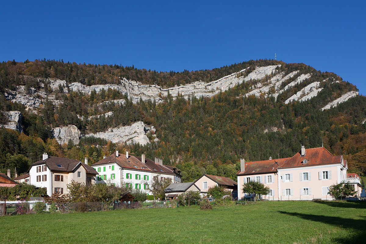 Teilansicht von Noiraigue mit der Clusette im Hintergrund